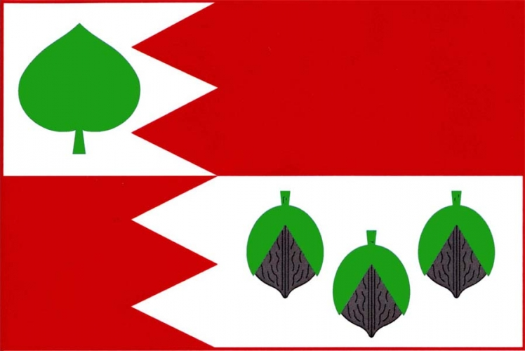 vlajka, Dřešín, okres Strakonice